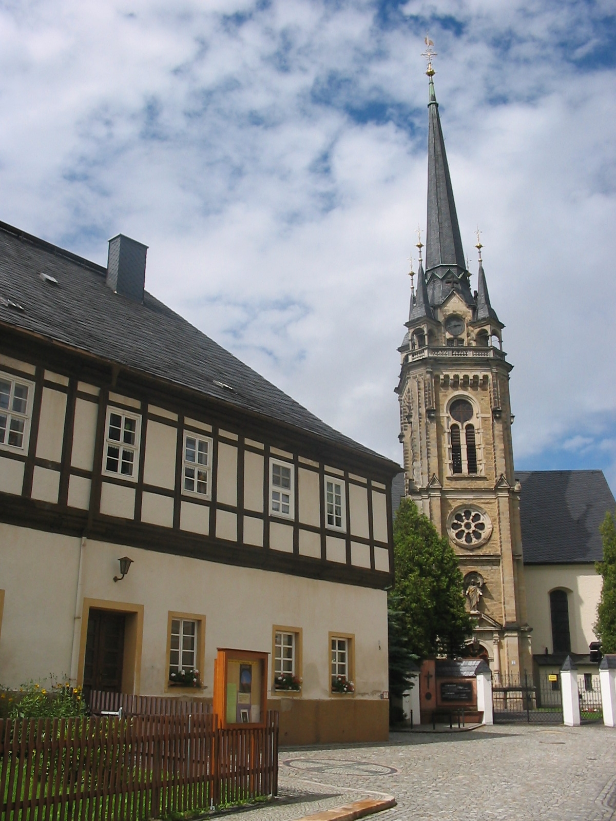 Sankt-Laurentiuskirche mit Pfarrhaus in Elterlein (Erzgebirge).